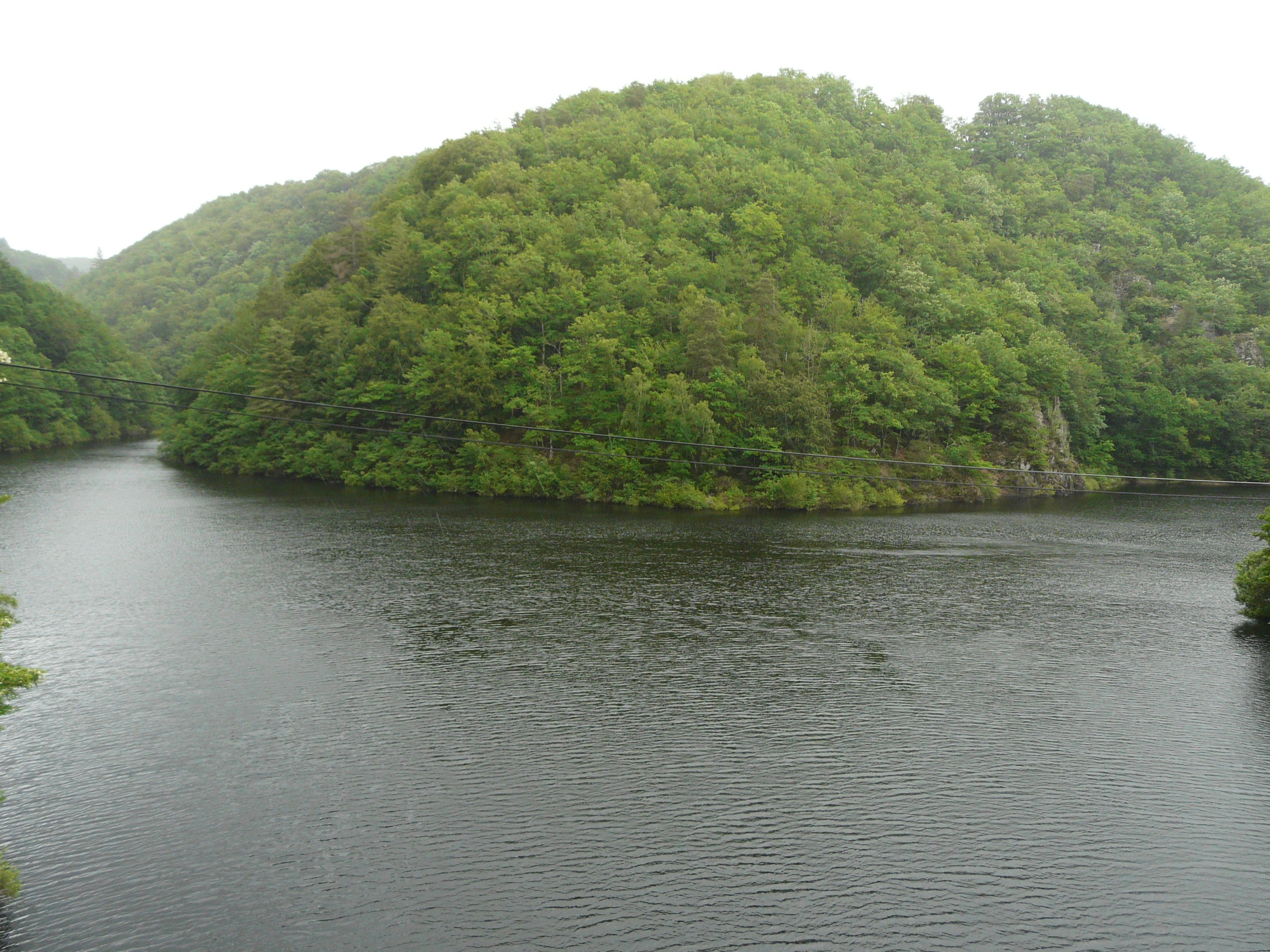 Sous la pluie, le confluent de la Panouille (venant de la gauche) et de la Tialle (venant de la droite) dans la retenue du barrage de Bort-les-Orgues, en amont du pont d'Entraigues, sur la route départementale 49. Communes de Beaulieu (à gauche) et Lanobre (à droite et en face), Cantal, France.